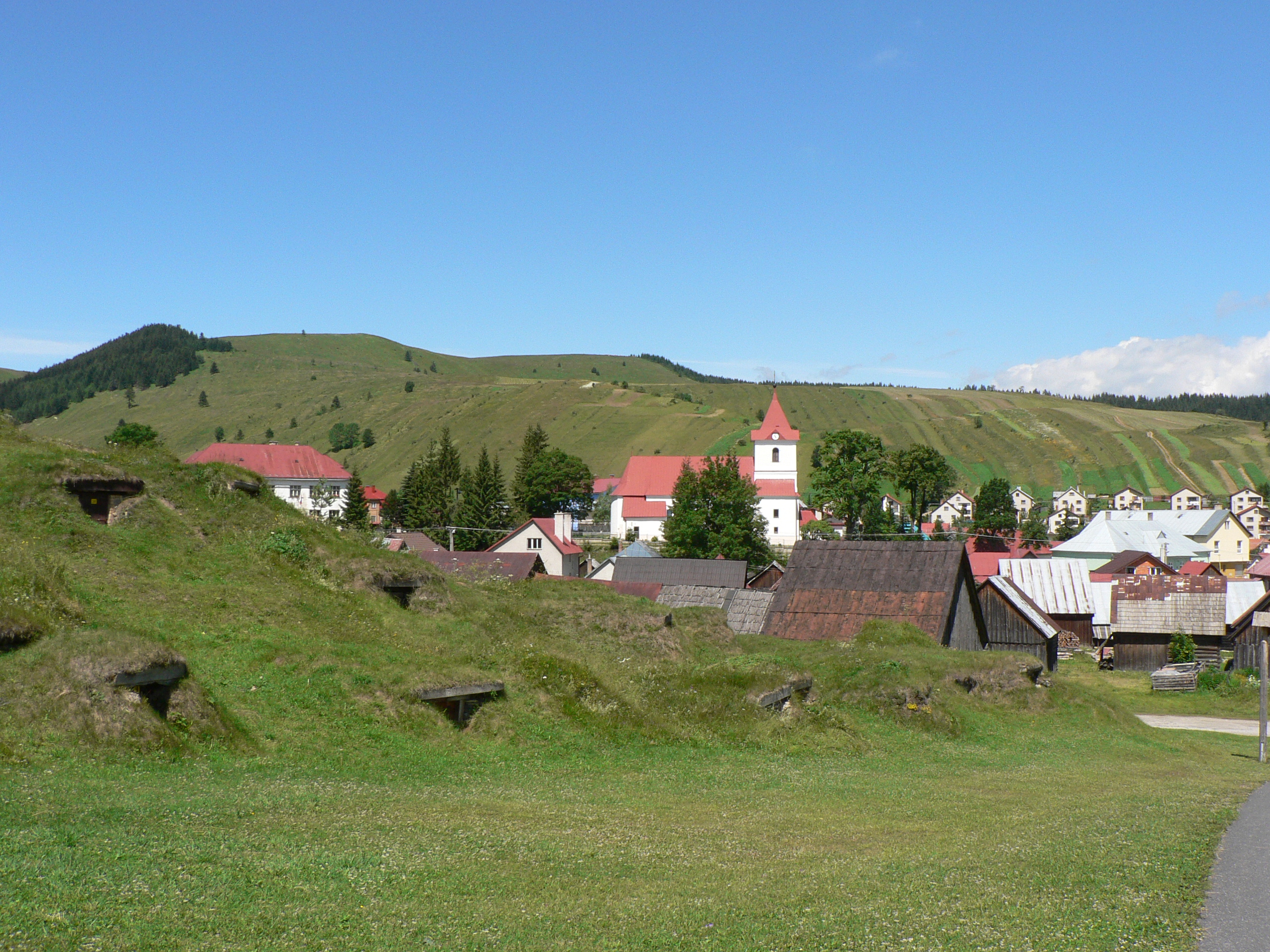 Pivničky, v ktorých obyvatelia obce uskladňujú zemiaky a zeleninu.. Je to európsky unikát. V stabilnej teplote 2 až 6 °C si zemiaky a zelenina udržia pomerne dobrú kvalitu po celý rok. Do jednej pivničky sa zmestí 30 i viac vriec zemiakov.